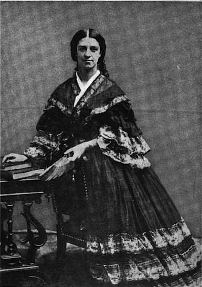 Susan Hale, ca.1865